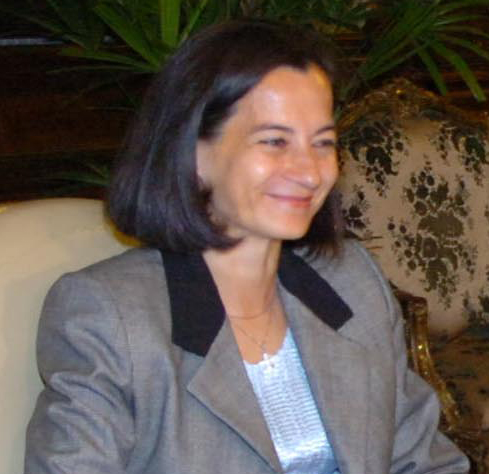 Clara Rojas, colombian politician, (croped)